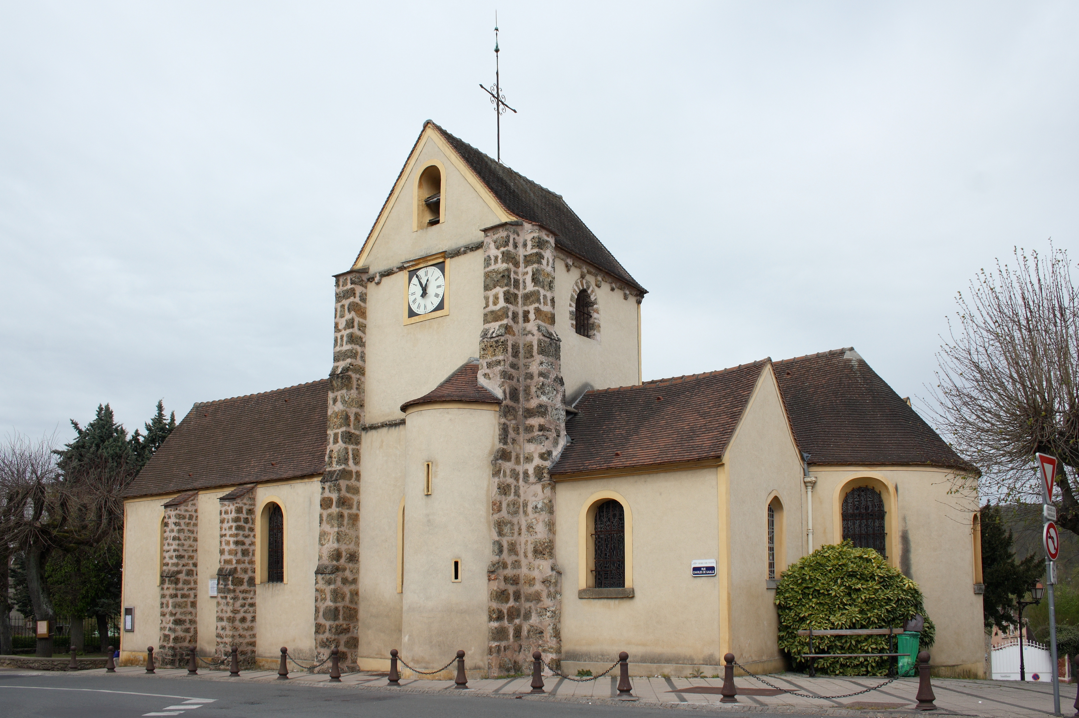 Katholische Pfarrkirche Saint-Matthieu in Bures-sur-Yvette im Département Essonne (Île-de-France), Ansicht von Südosten